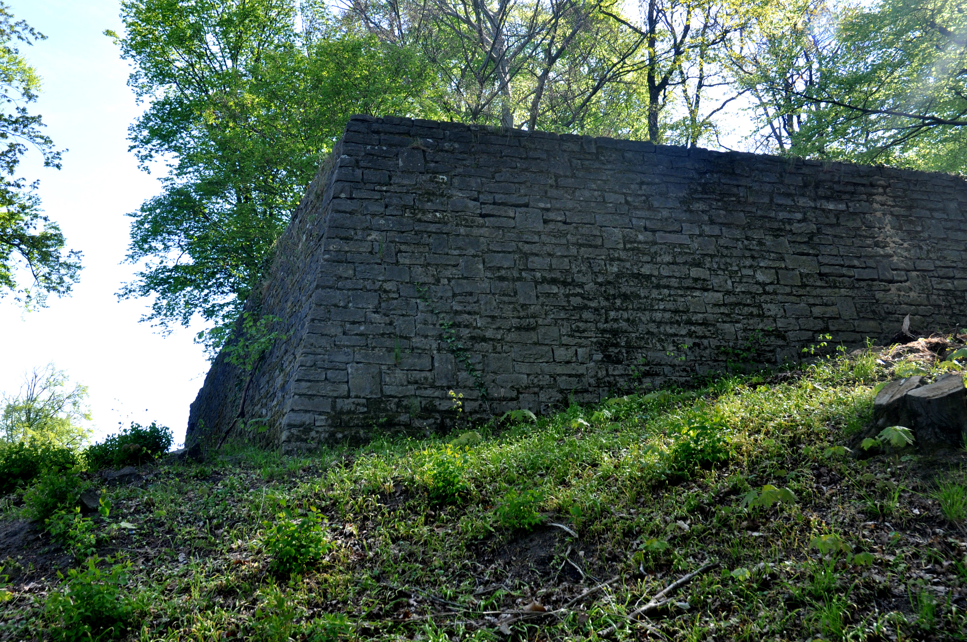 Park Klein-Glienicke, Bastion am Jägerhof